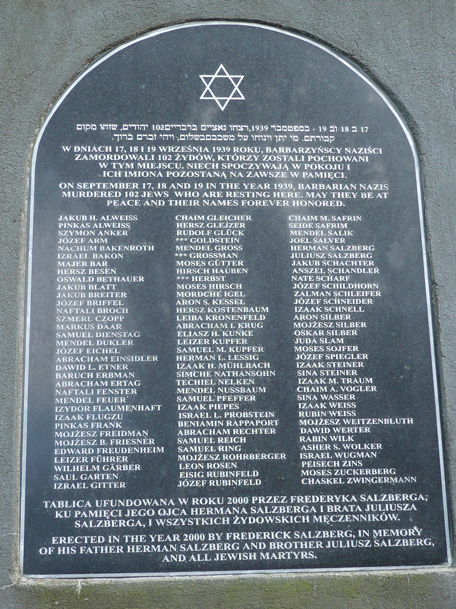 Przemyśl, nowy cmentarz żydowski